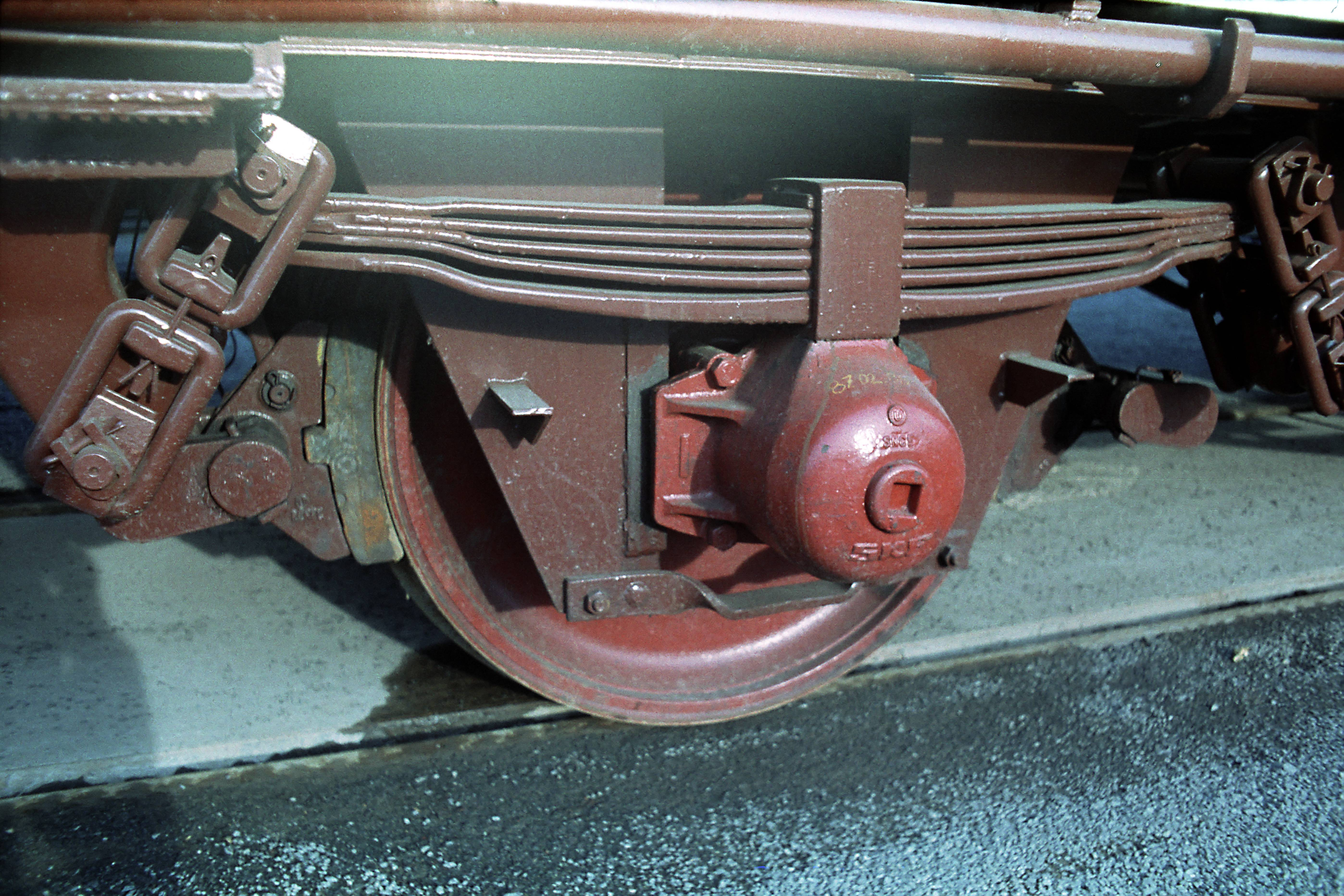 umspurbar auf iberische Breitspur, auf den Winkeleisen stützt sich die Tragfeder beim Anheben ab, die Bremsdreiecke sind umstellbar, der Abstand der Langträger hat iberisches Maß.